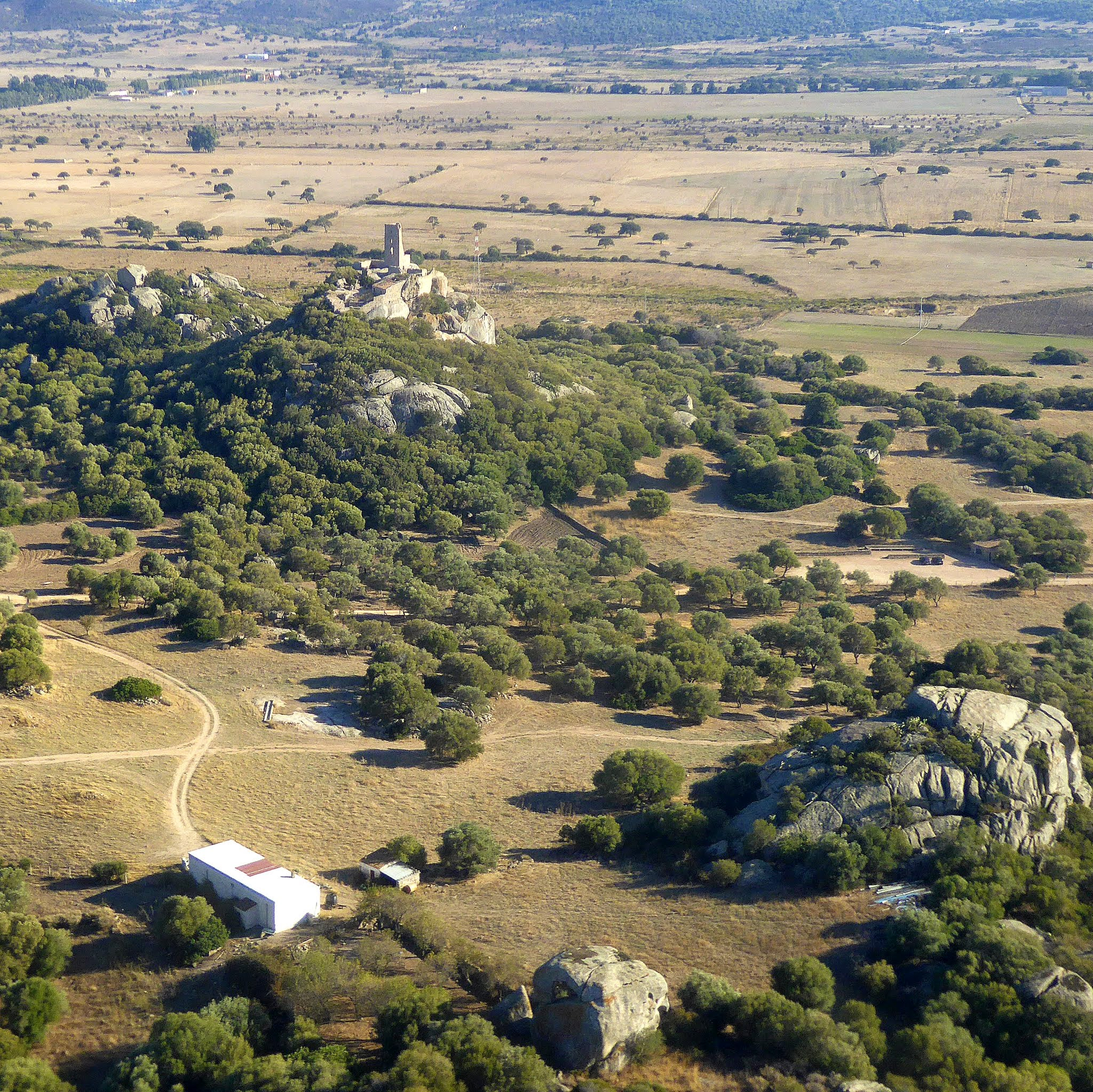 Comune di Olbia, Sardinien, Italy